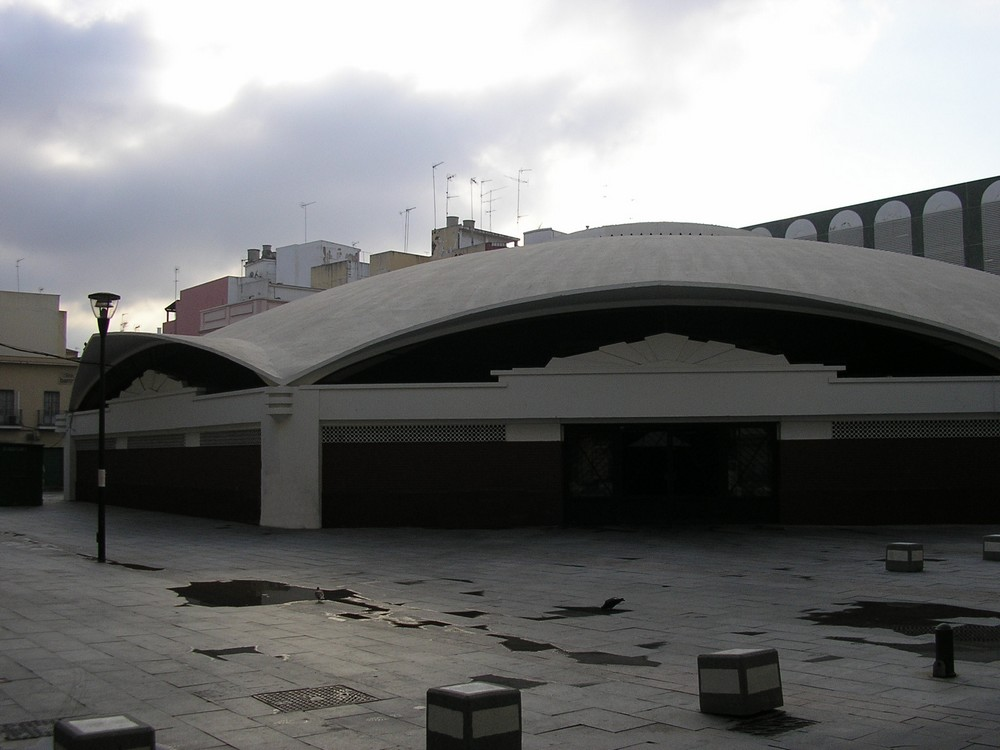 Plaza de Abastos Plaza de Abastos de Algeciras, obra del ingeniero Eduardo Torroja Miret. Fotografia realizada por mi el dia 17 de agosto de 2007